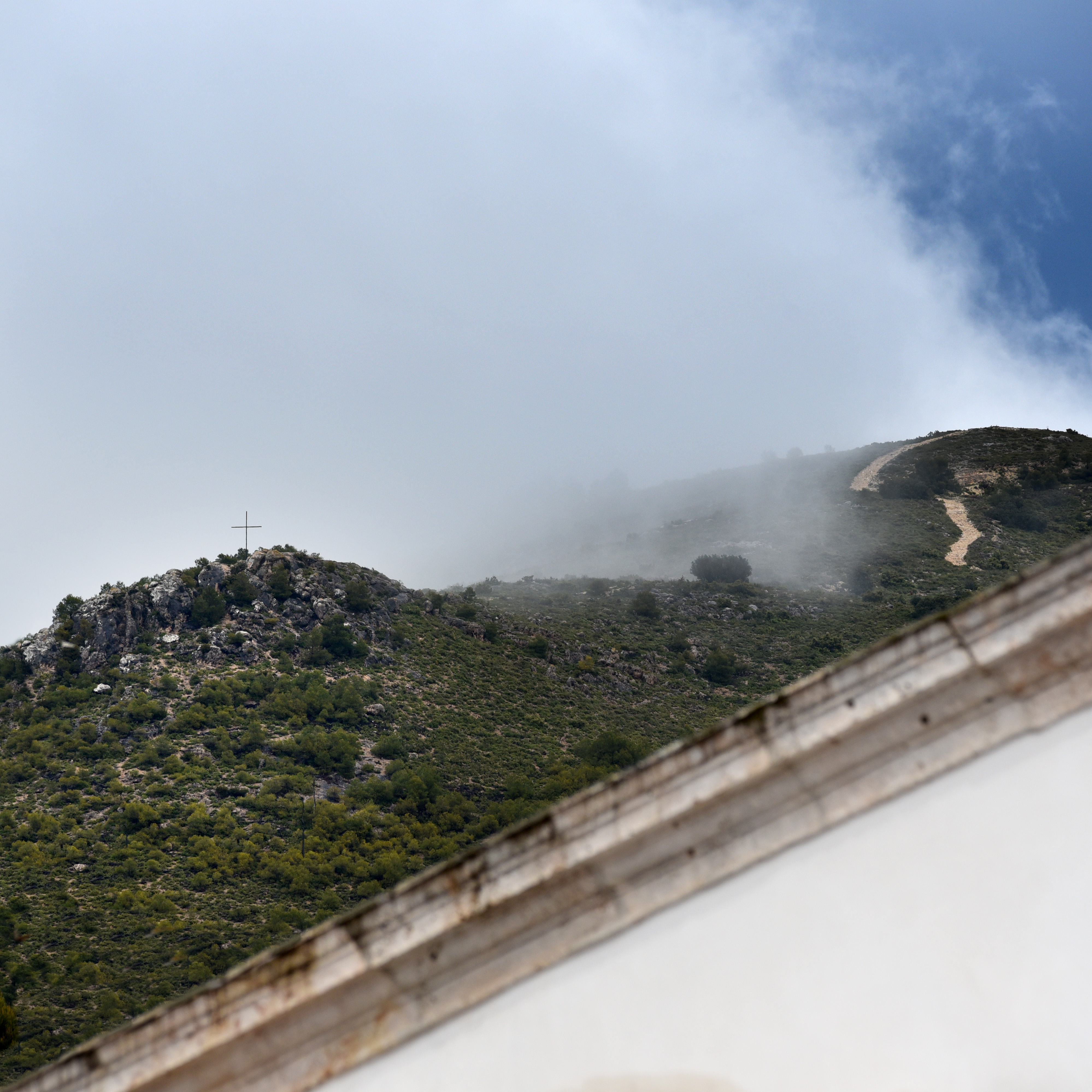 Tossal de l'Àguila, amb la creu. A la dreta, Morro del Porc.